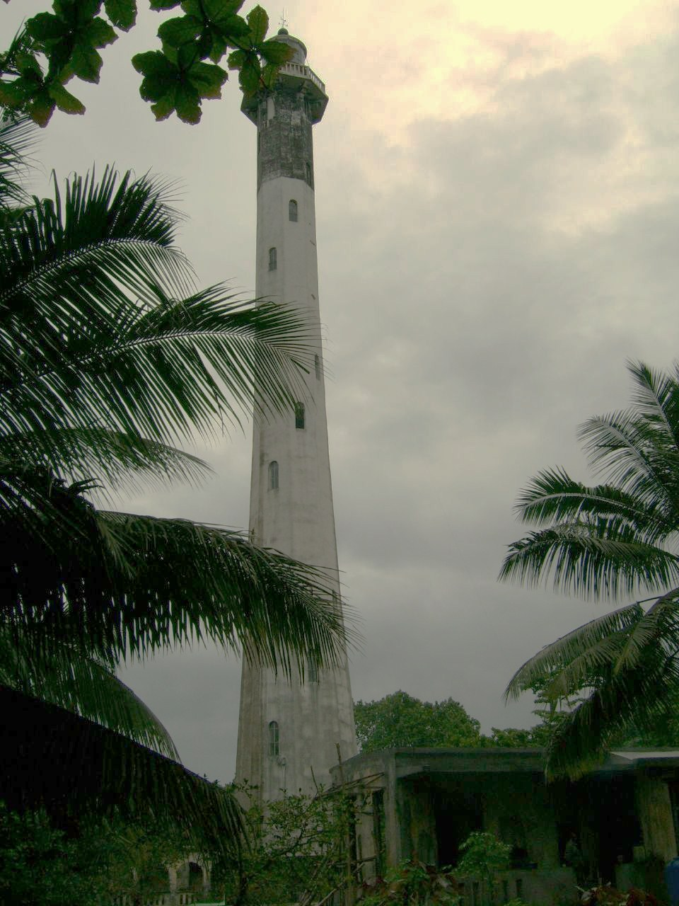 Phare de l'Ile aux Prunes